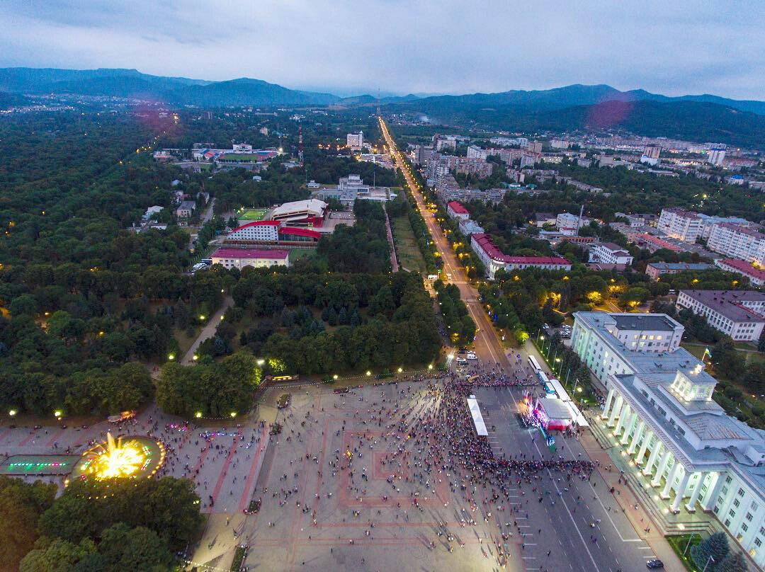 Вид на город Нальчик Адыгэбзэ: Налшык къалэ и теплъэгъуэ